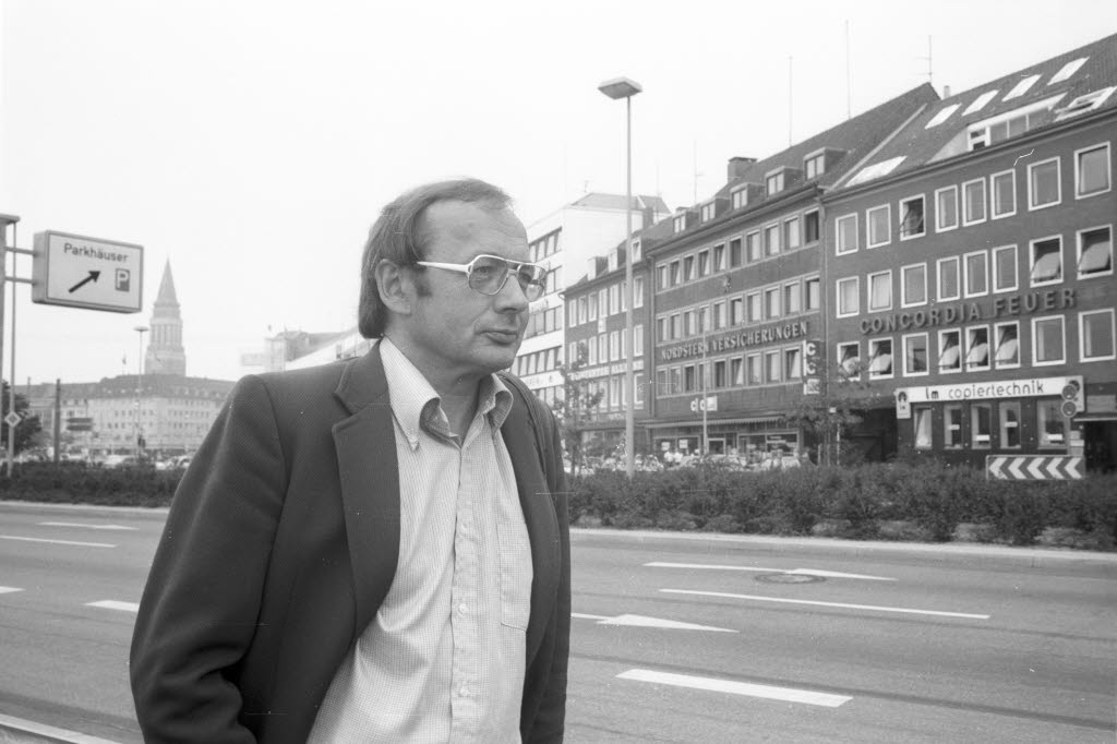 Der gebürtige Kieler hat einen Roman über den Suizid eines Kieler Fotomodels 1974 geschrieben. Dabei begab sich der Autor auch auf die Spuren seiner Kindheit, wie hier am Wall, wo sein Großvater ein Haus besaß.